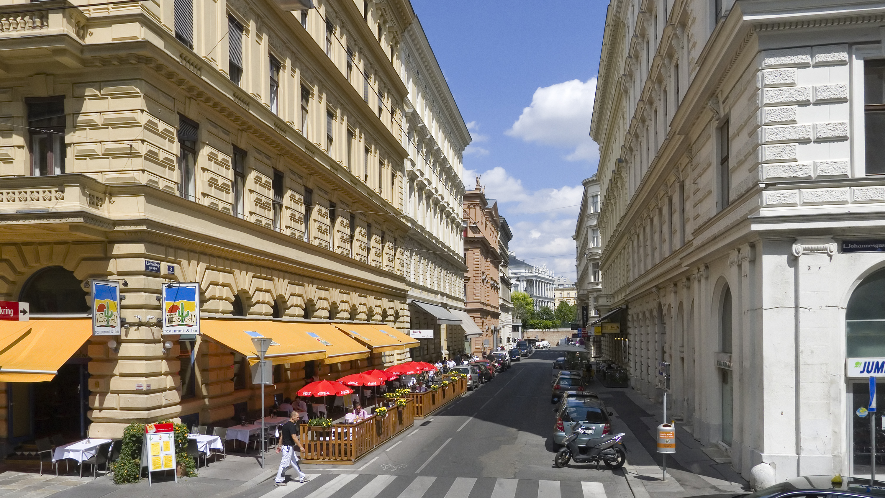 Schellinggasse in Wien 1 bei Nr. 7 Richtung Nordosten